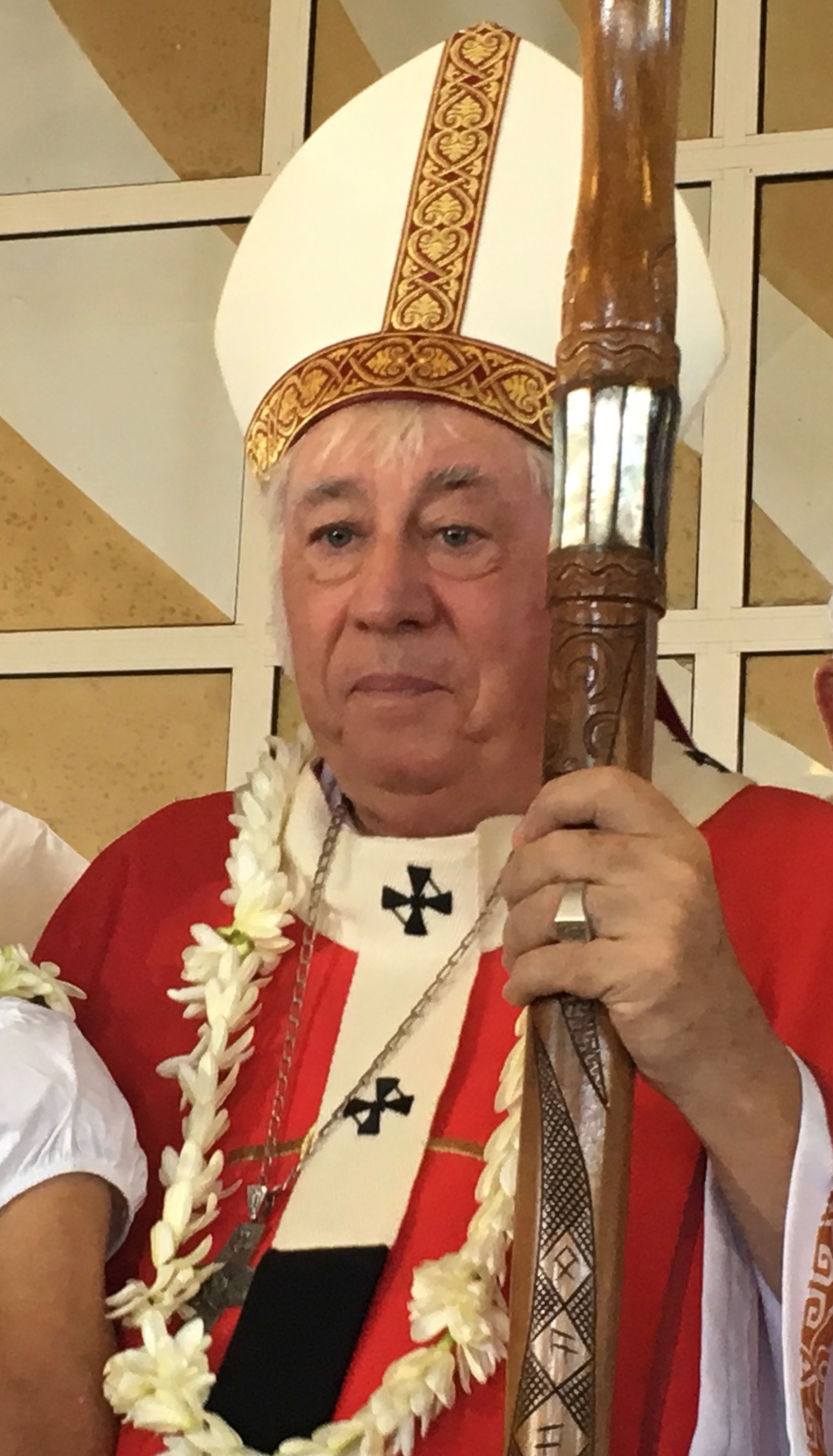 Mgr Cottanceau évêque de Papeete